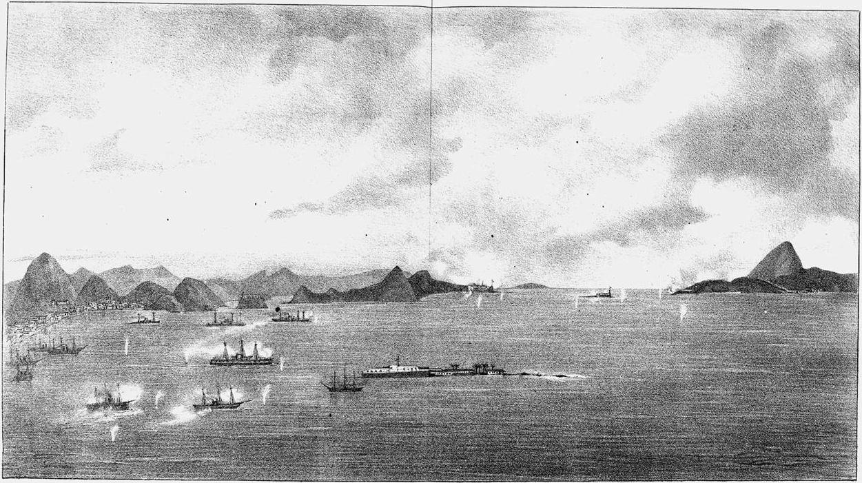 Revolta de 6 de Setembro de 1893. Aspecto da bahia do Rio de Janeiro no dia 13 de Setembro, durante o bombardeio entre as fortalezas e os navios revoltosos